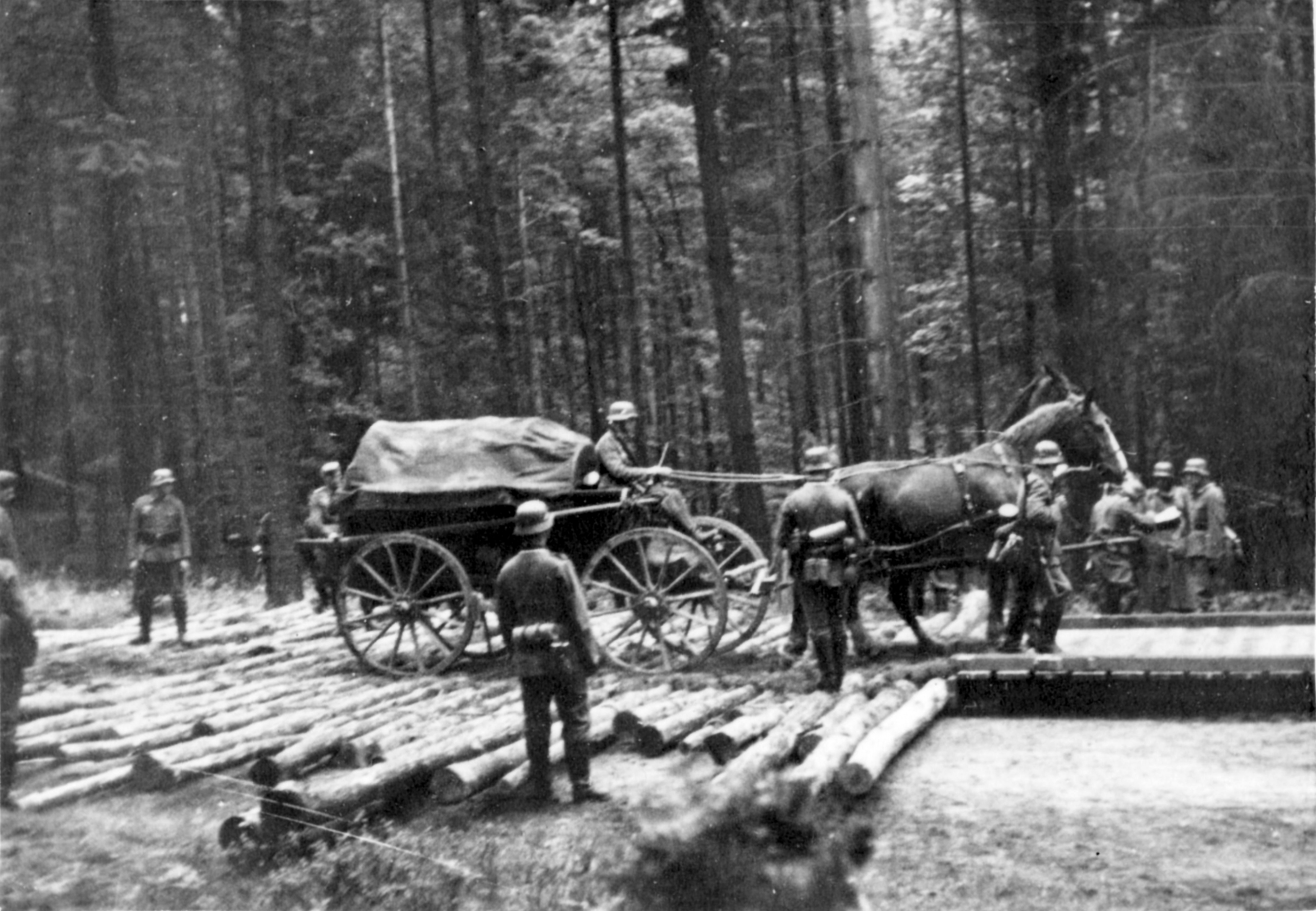 Übung der Wehrmacht in sumpfigen Gelände bei Bad Liebenwerda